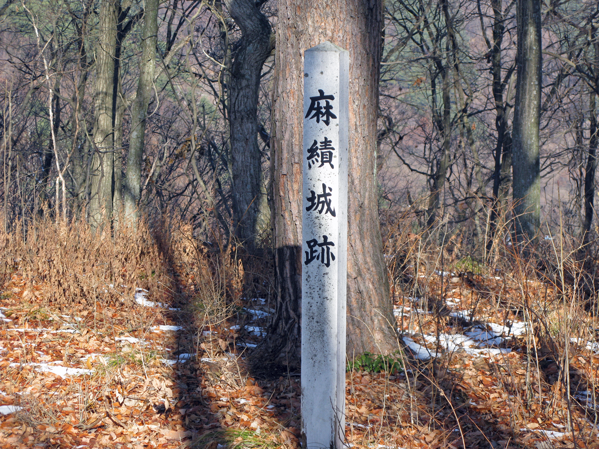 麻績城